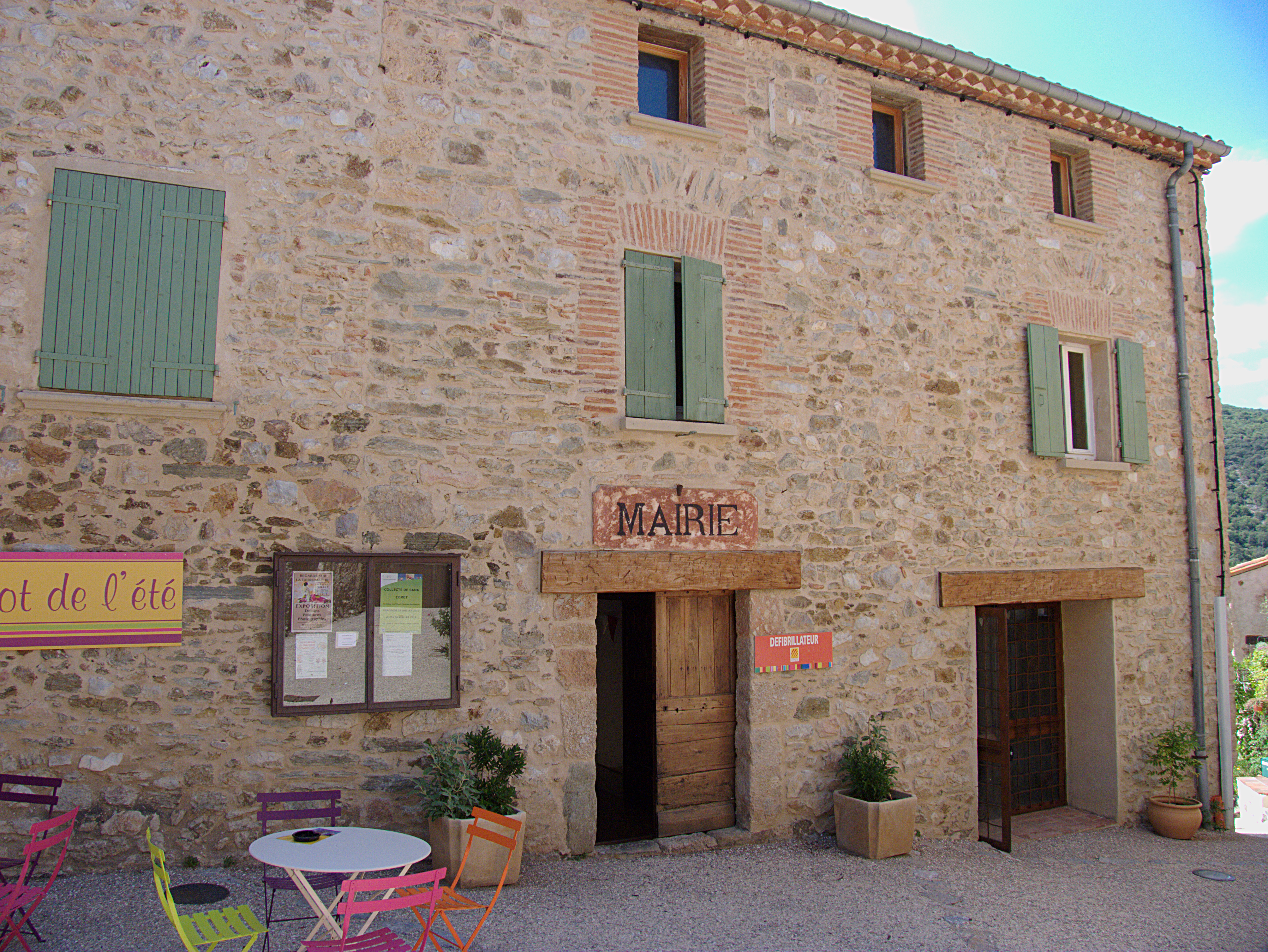 Mairie, Calmeilles (Pyrénées-Orientales, Languedoc-Roussillon, France)